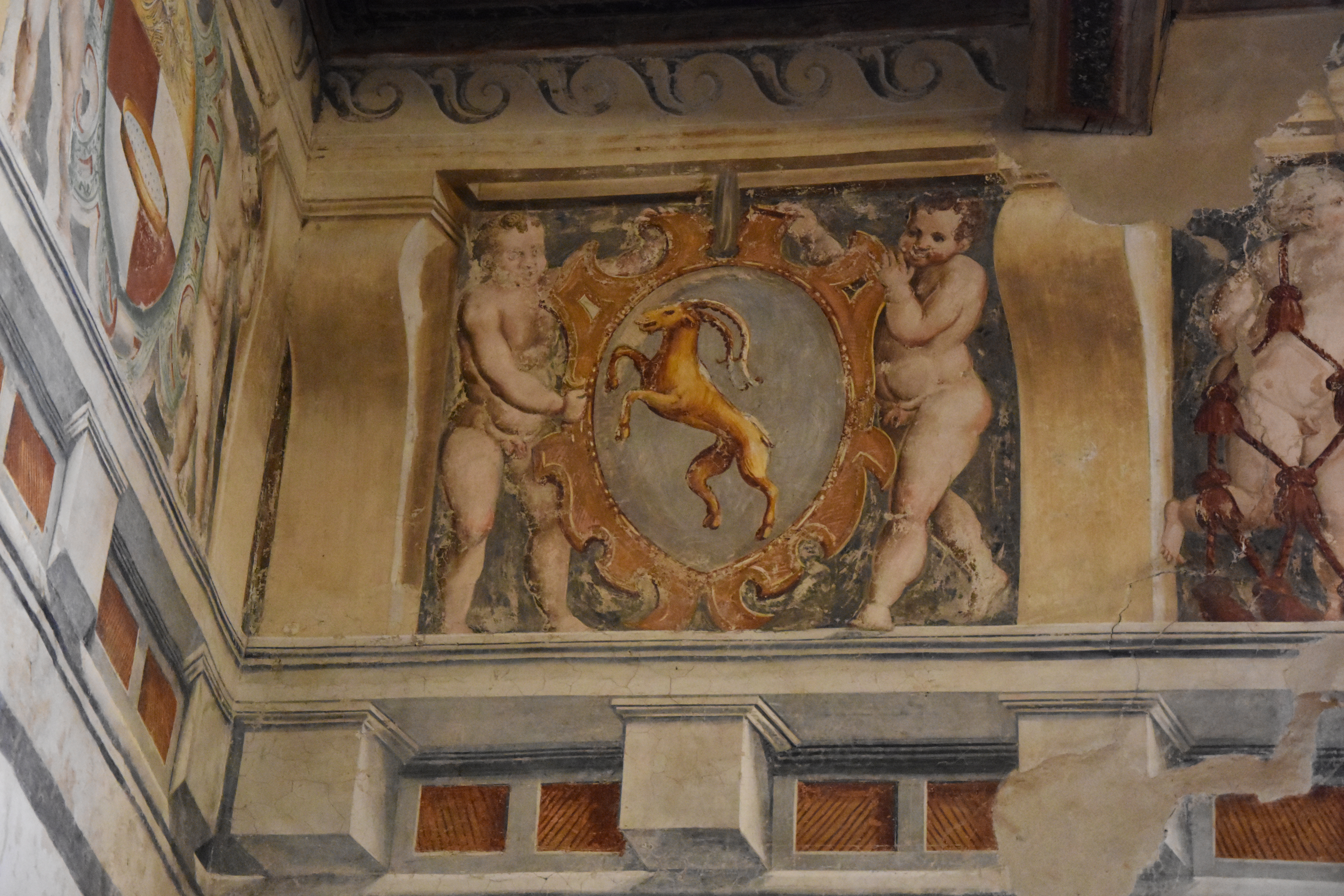 Castello di Melegnano, sala degli stemmi, particolare degli affreschi cinquecenteschi.